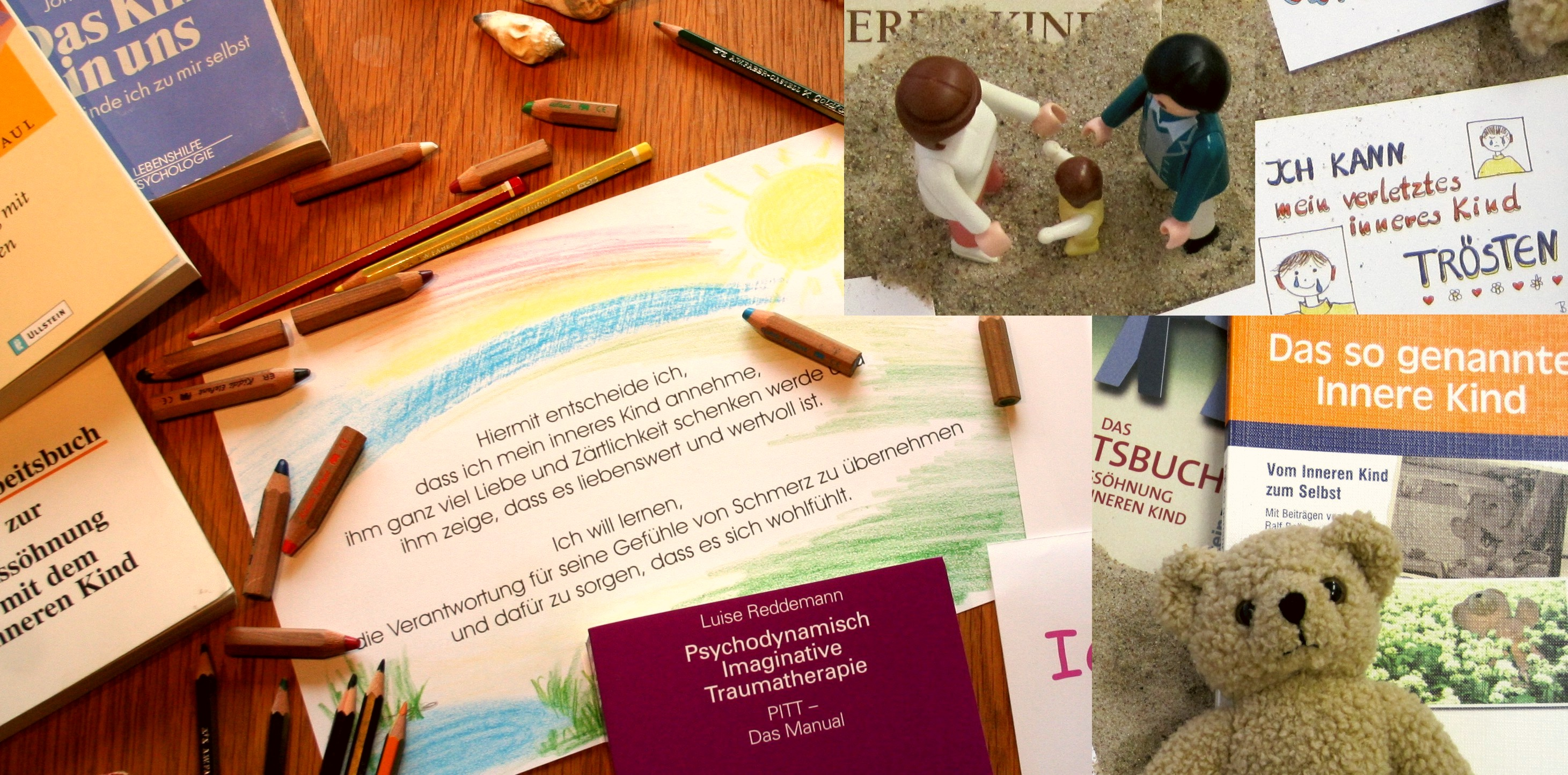 geeignete Arbeitsmaterialien zur Inneren Kind Arbeit in der Psychotherapie: Literatur zum inneren Kind (Aussöhnung mit dem inneren Kind, Arbeitsbuch zur Aussöhnung mit dem inneren Kind, Psychodynamisch imaginative Traumatherapie, Das sogenannte innere Kind, u.a.); Aufstellungen zum inneren Kind mit Spielfiguren (z.B. mit Playmobil oder auch im Sandspiel); Trösten des inneren Kindes mit Plüschfiguren z.B. Teddi; eigene neue Lebenssätze für die Selbstfürsorge finden, z.B. Arbeit zum inneren Kind mit "Lebenskarten" (Lebenskarten wie auf